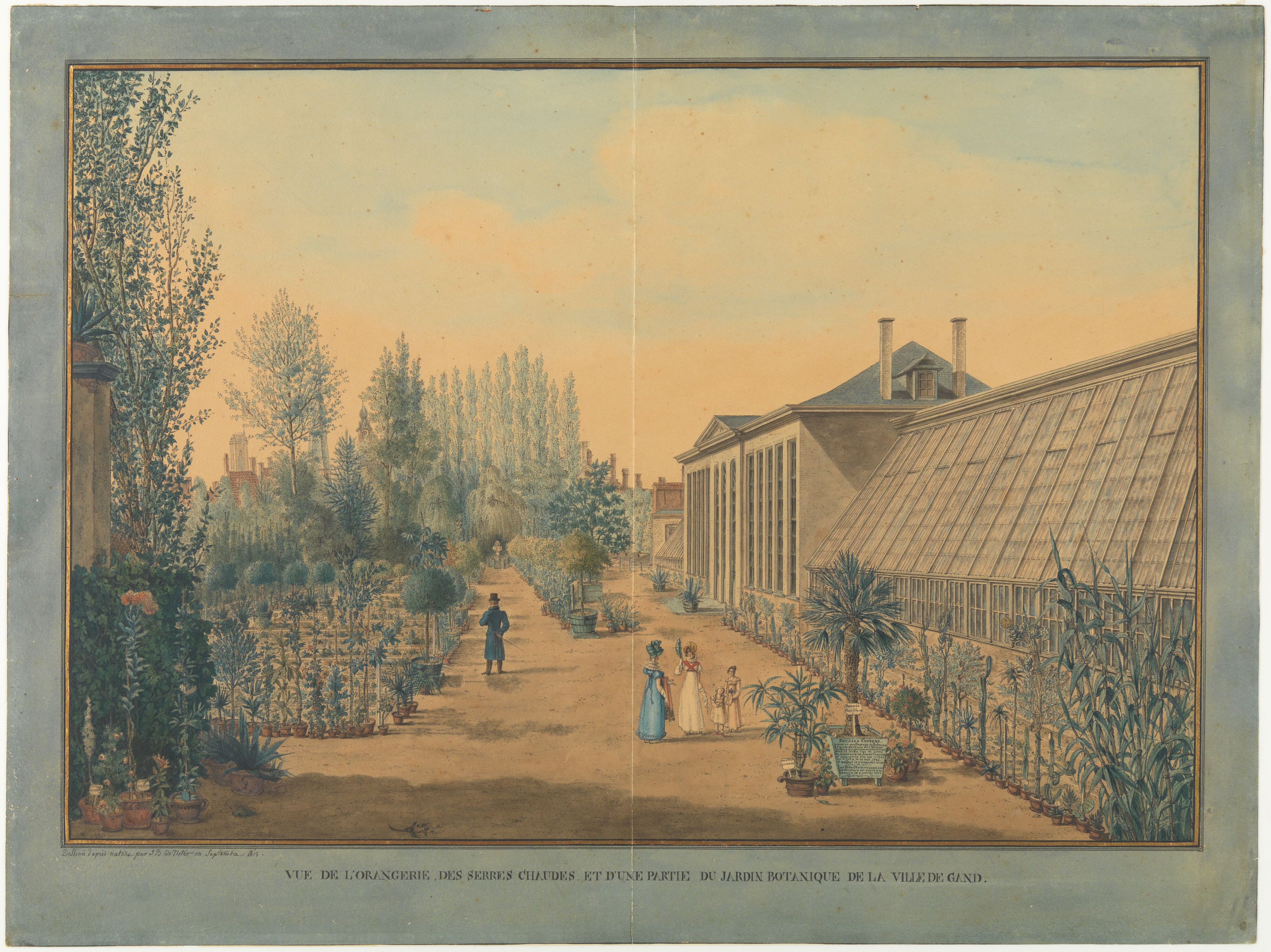 Plantencollecties en serres van de Gentse plantentuin gelegen aan de voormalige Baudelo abdij